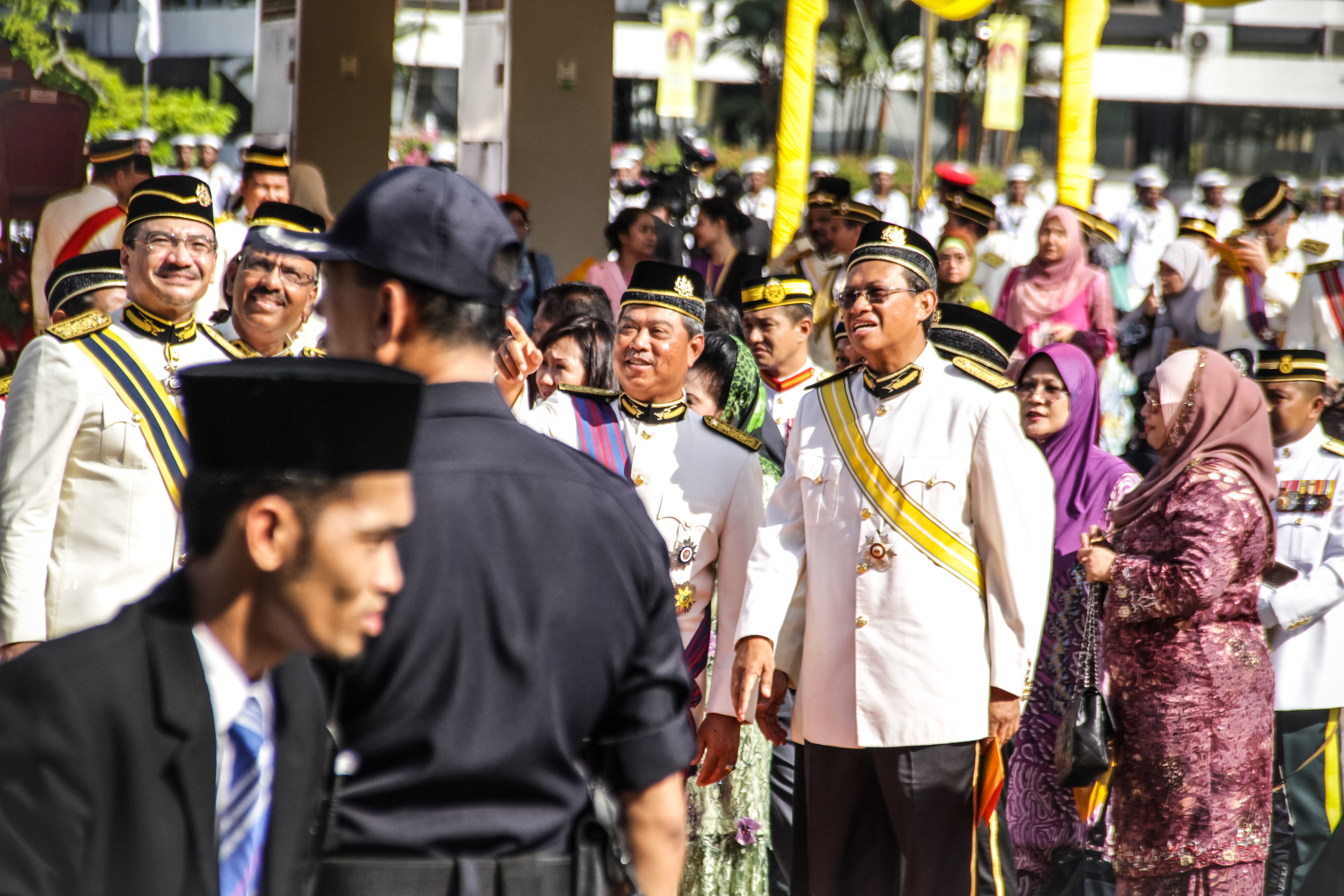 Istiadat Mengarak Panji-Panji Seri Paduka Baginda Yang Dipertuan Agong 2013